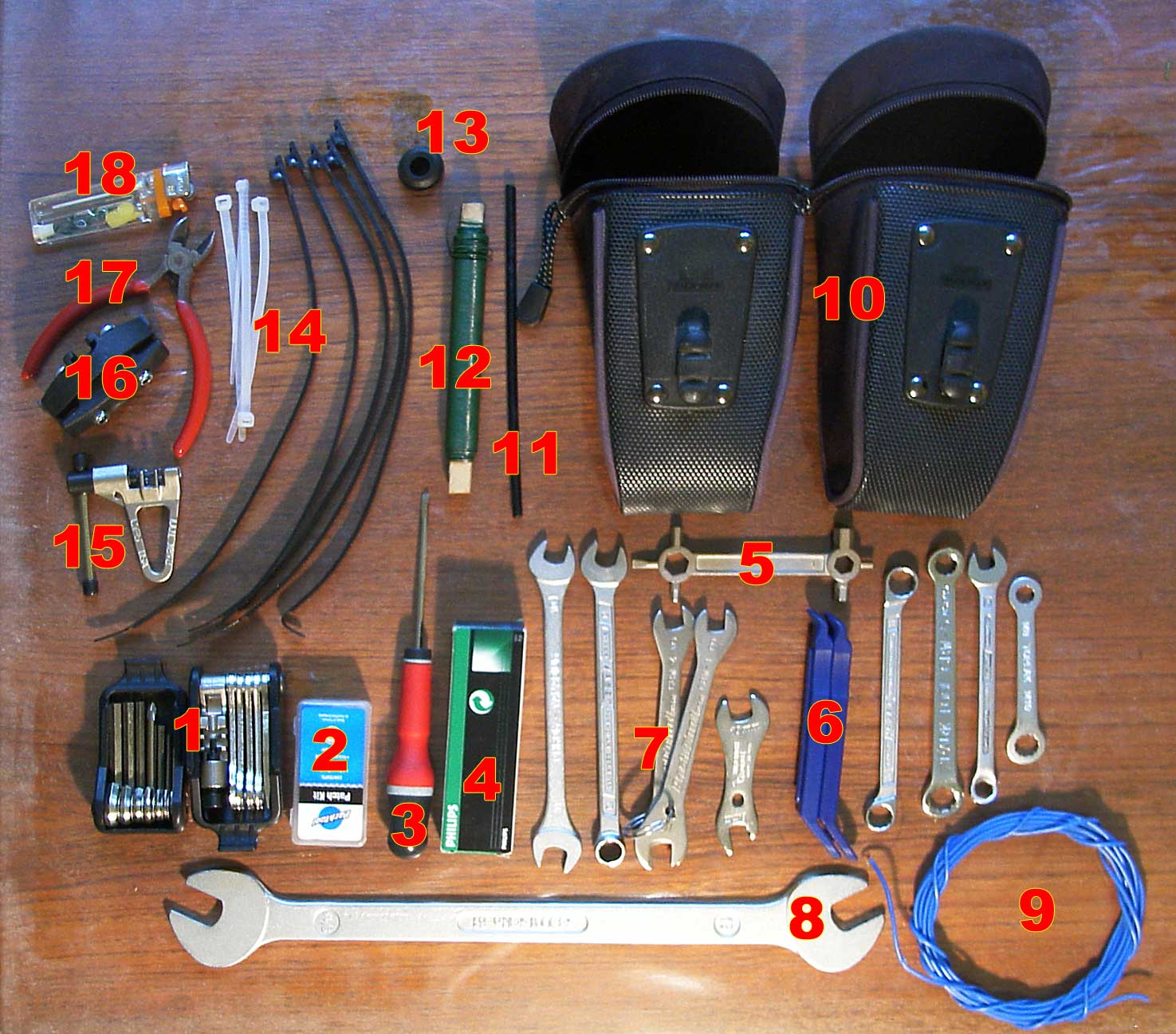 Fahrradwerkzeug für unterwegs Kamera Ricoh RDC-i500